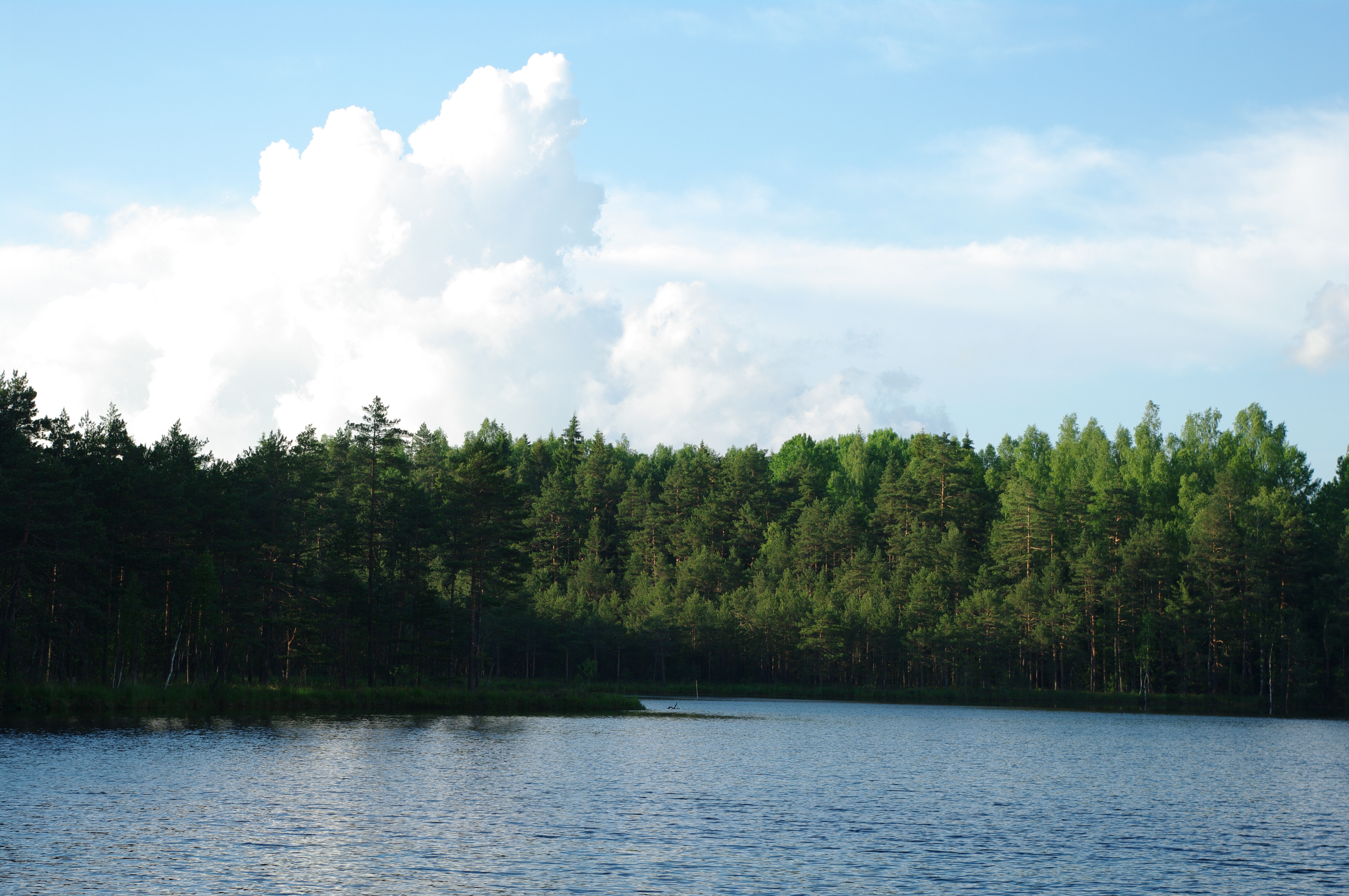 Immaku järv Misso vallas